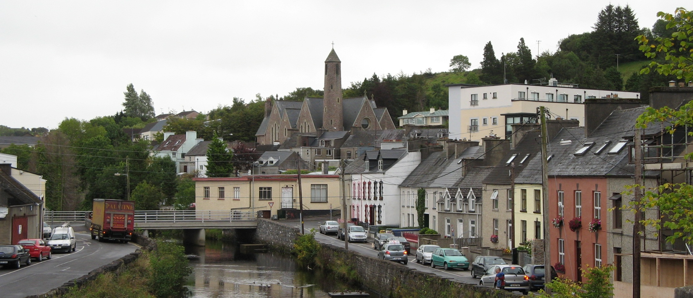 Donegal